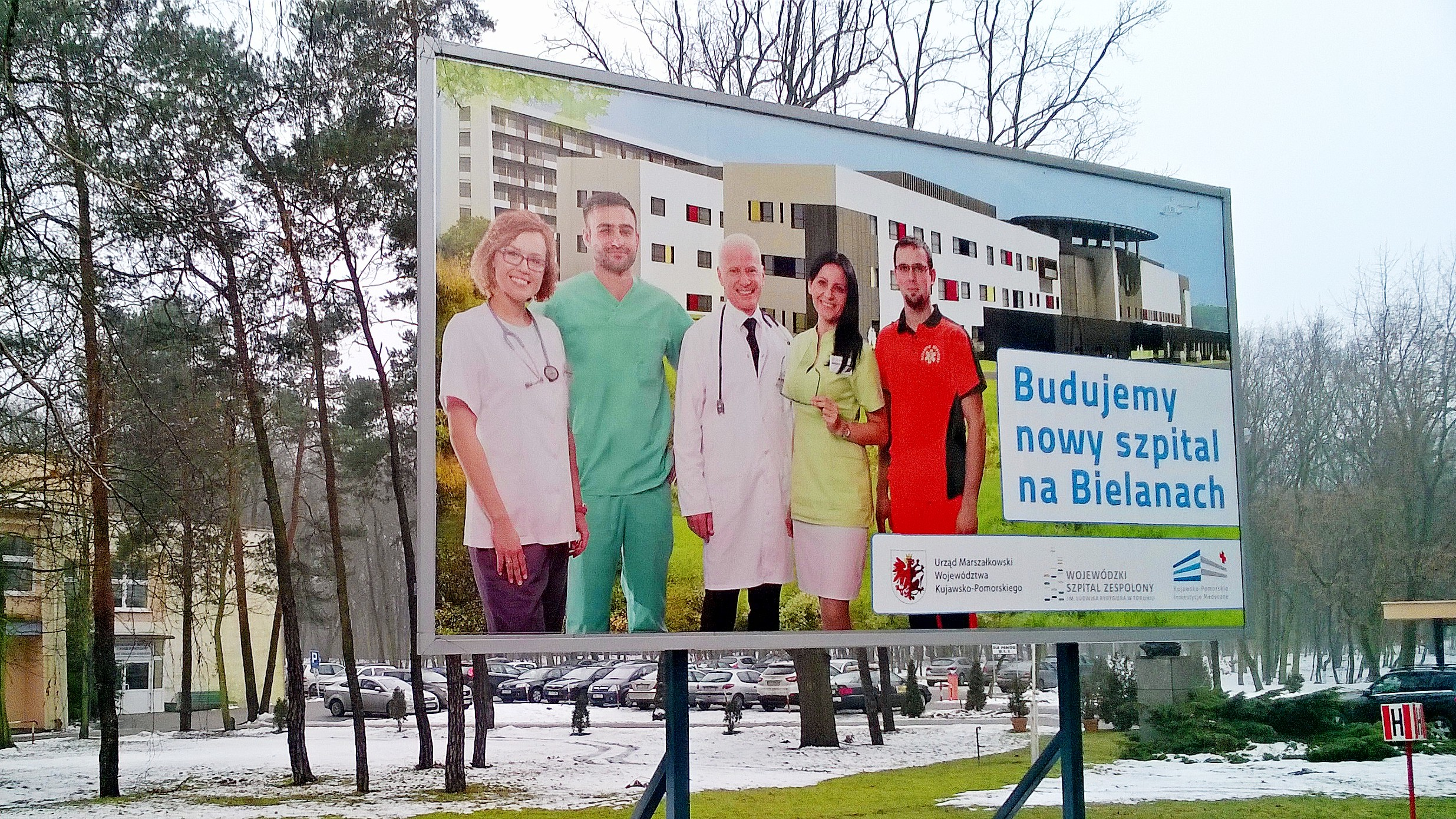 Billboard informujący o rozbudowie Wojewódzkiego Szpitala Zespolonego w Toruniu